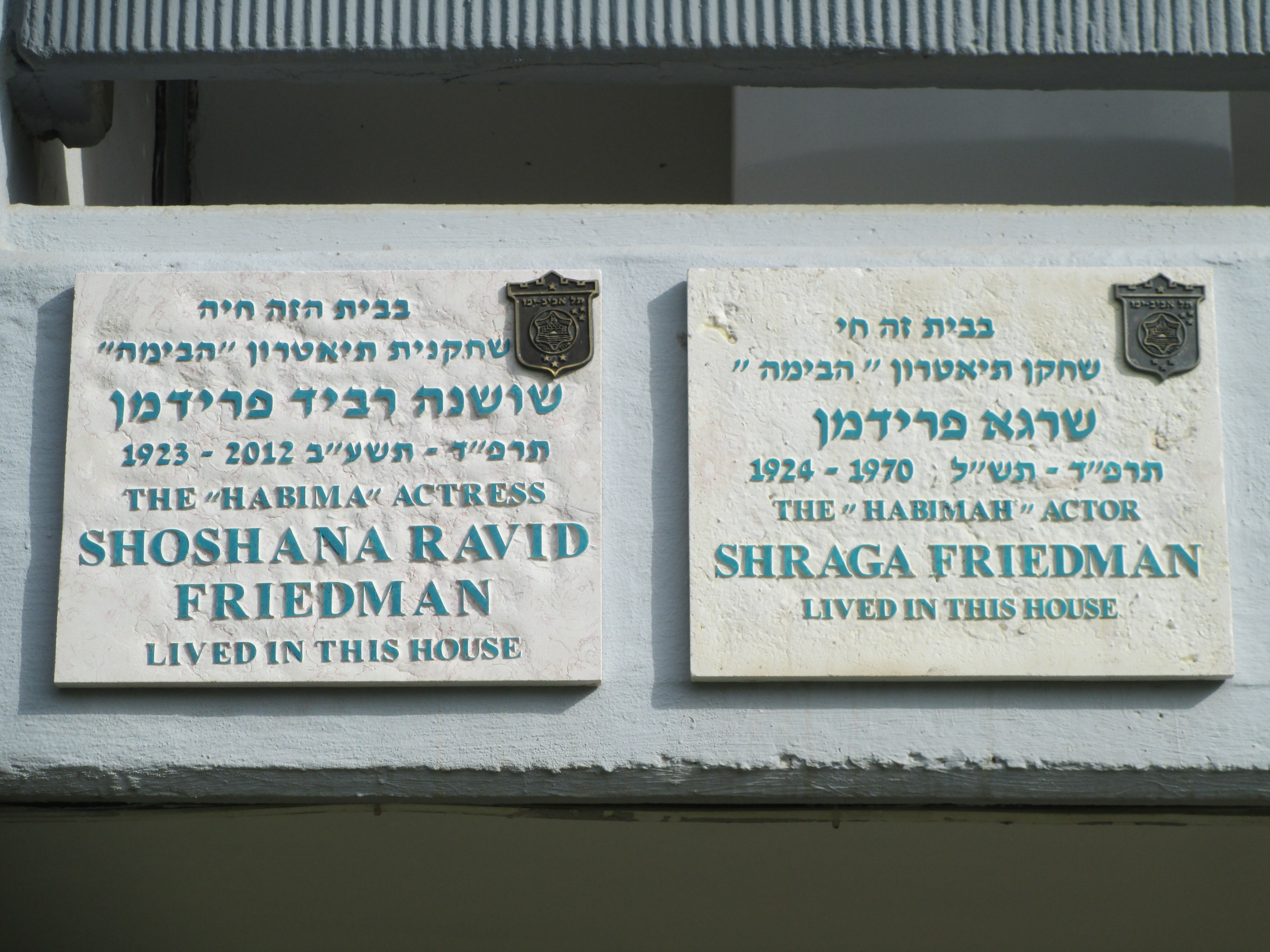 לוחיות זיכרון לזוג השחקנים שושנה רביד פרידמן ושרגא פרידמן על ביתם ברחוב איינשטיין 75 בתל אביב